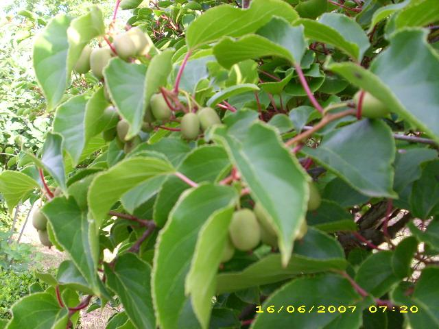 Öntermékeny kopasz kivi (Actinidia arguta 'Issai'), Regenye. Egyéb nevek: bajorkivi, japán egres, minikivi, weiki